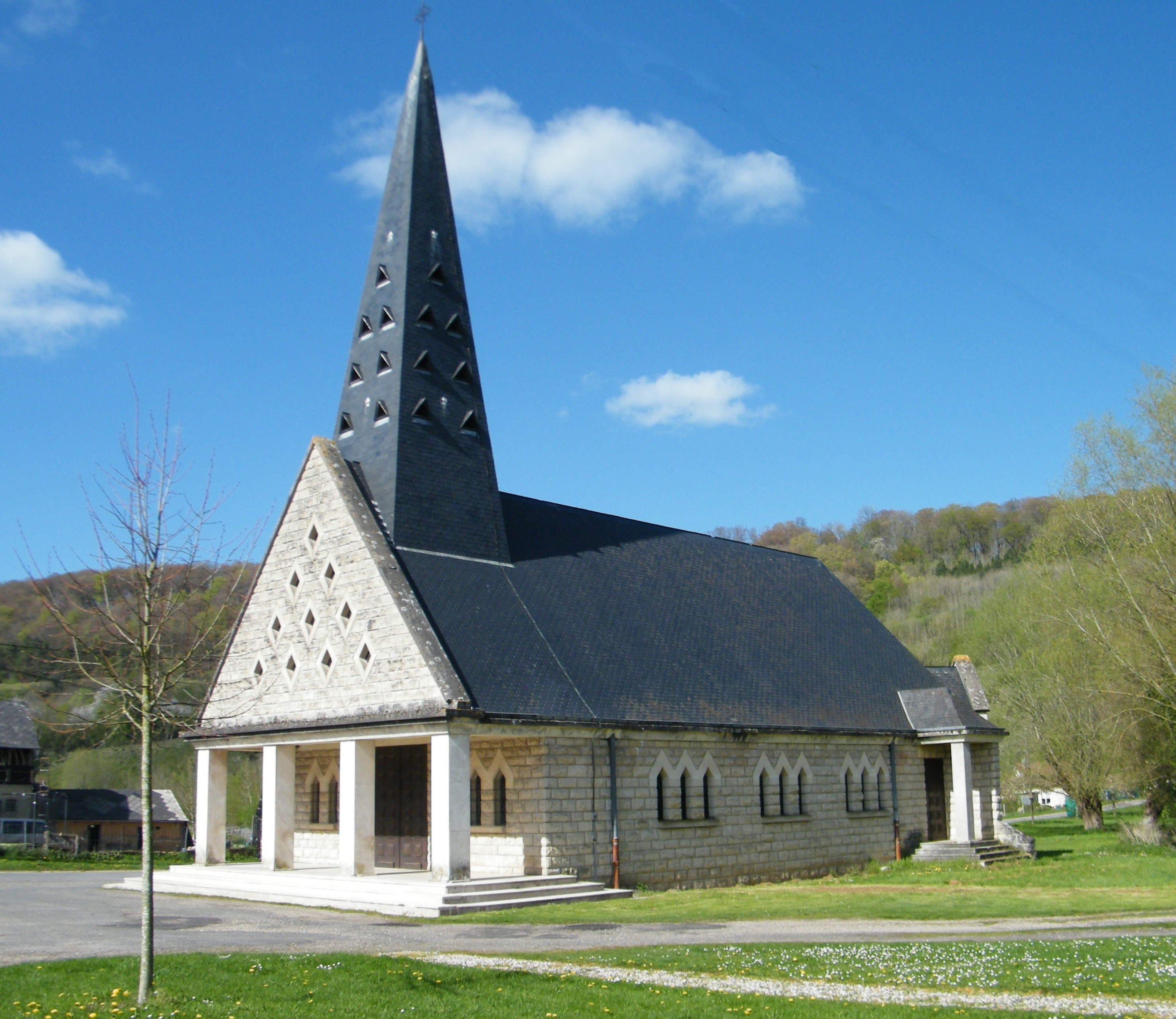 L'église.